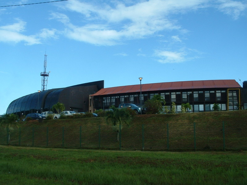 description: RFO Guyane auteur didwin